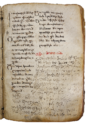 ოთხთავი (H-1741)